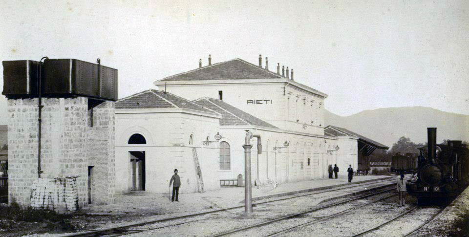 Stazione di Rieti. Immagine tratta dalla raccolta di fotografie sulla costruenda ferrovia Terni-Rieti-L'Aquila, realizzata da Achille Mauri per conto della "Società Italiana per le strade ferrate meridionali" e pubblicata nell'ottobre 1883.